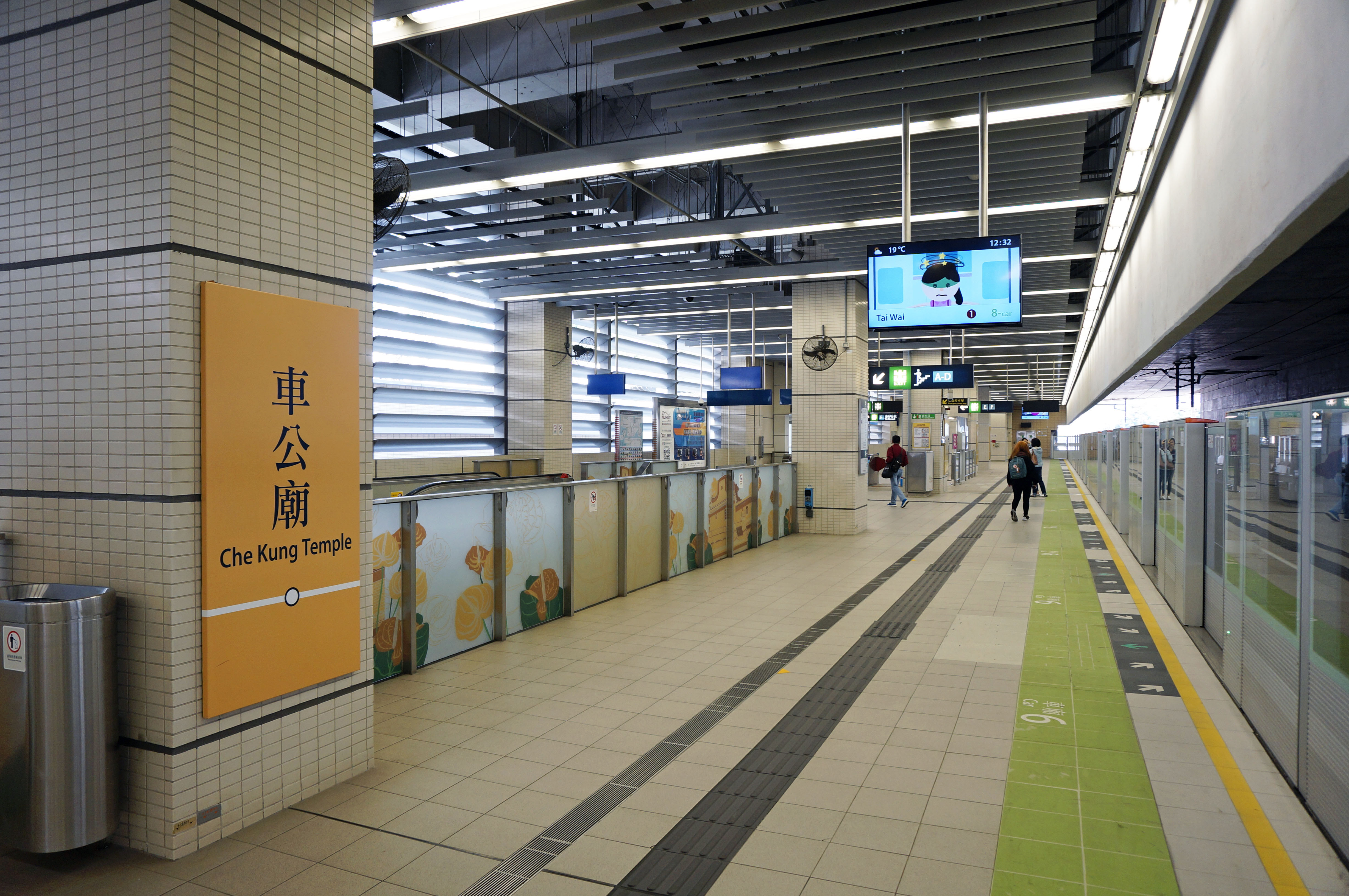 港鐵車公廟站月台